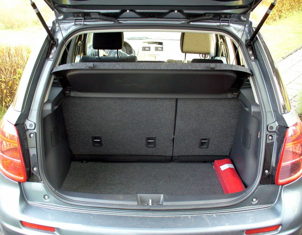 Kofferraum eines Suzuki SX4 Dance mit klassentypischer Auskleidung mit Nadelvlies